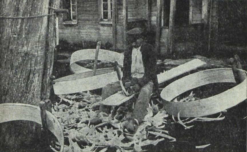 Avinurme mees sarjakehasid valmistamas